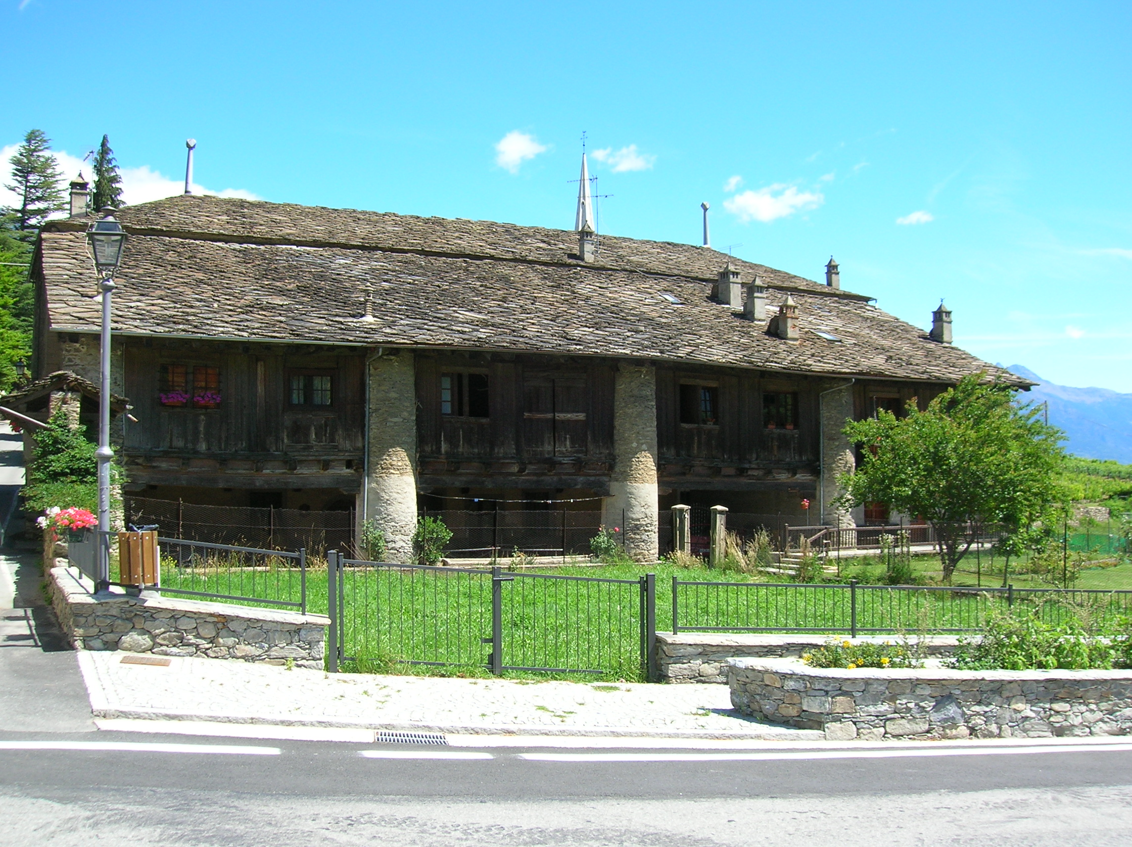 Cascina "L'Ola", antica scuderia del vicino castello di Introd. Ad Introd, Valle d'Aosta, Italia.